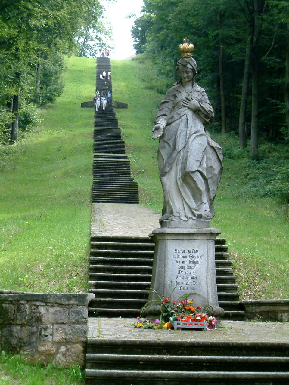 Wallfahrtsort Maria Ehrenberg - Treppenaufgang